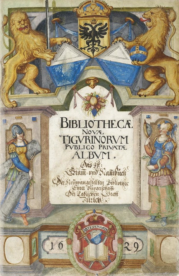 Zentralbibliothek Zürich, Arch. St. 22, fol. 3r: Donatorenbuch der Stadtbibliothek Zürich von 1629